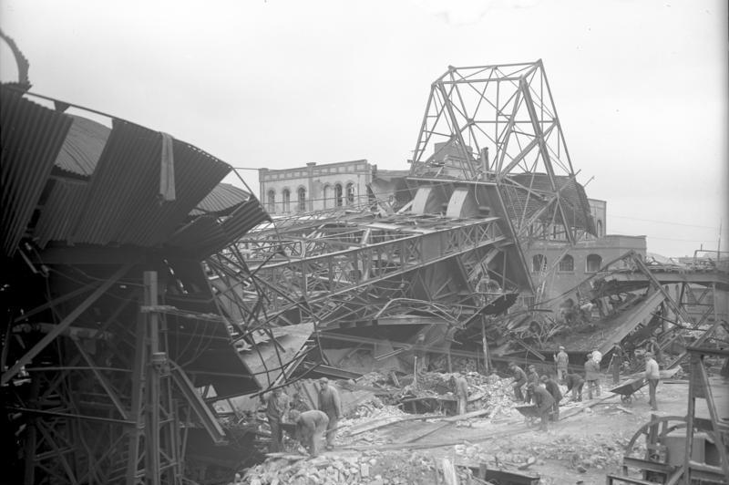 Die furchtbare Grubenkatastrophe in Alsdorf b/Aachen, bei welcher über 233 Tote zu beklagen sind. Eine Stätte des Grauens. Der vollständig zusammengestürzte Förderturm der Grube Anna II in Alsdorf b/Aachen.